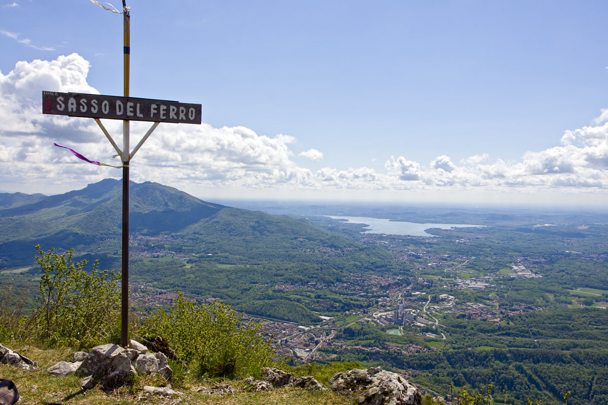 Panorama dalla cima del monte Sasso del Ferro (1062 m s.l.m.) Sullo sfondo il lago di Varese e il massiccio del Campo dei fiori